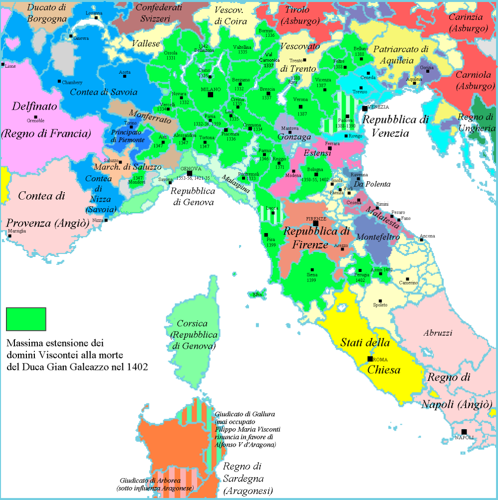 Massima estensione dei domini Viscontei alla morte del Duca Gian Galeazzo nel 1402.